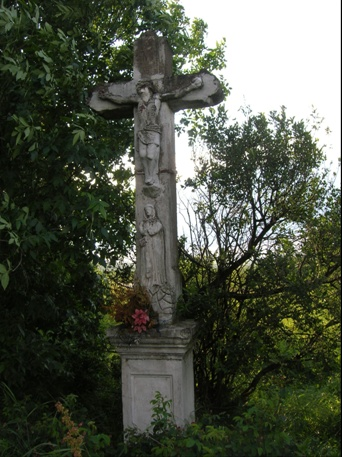 Kétszáz éves kőkereszt a kövesdi út mellett Ostoroson